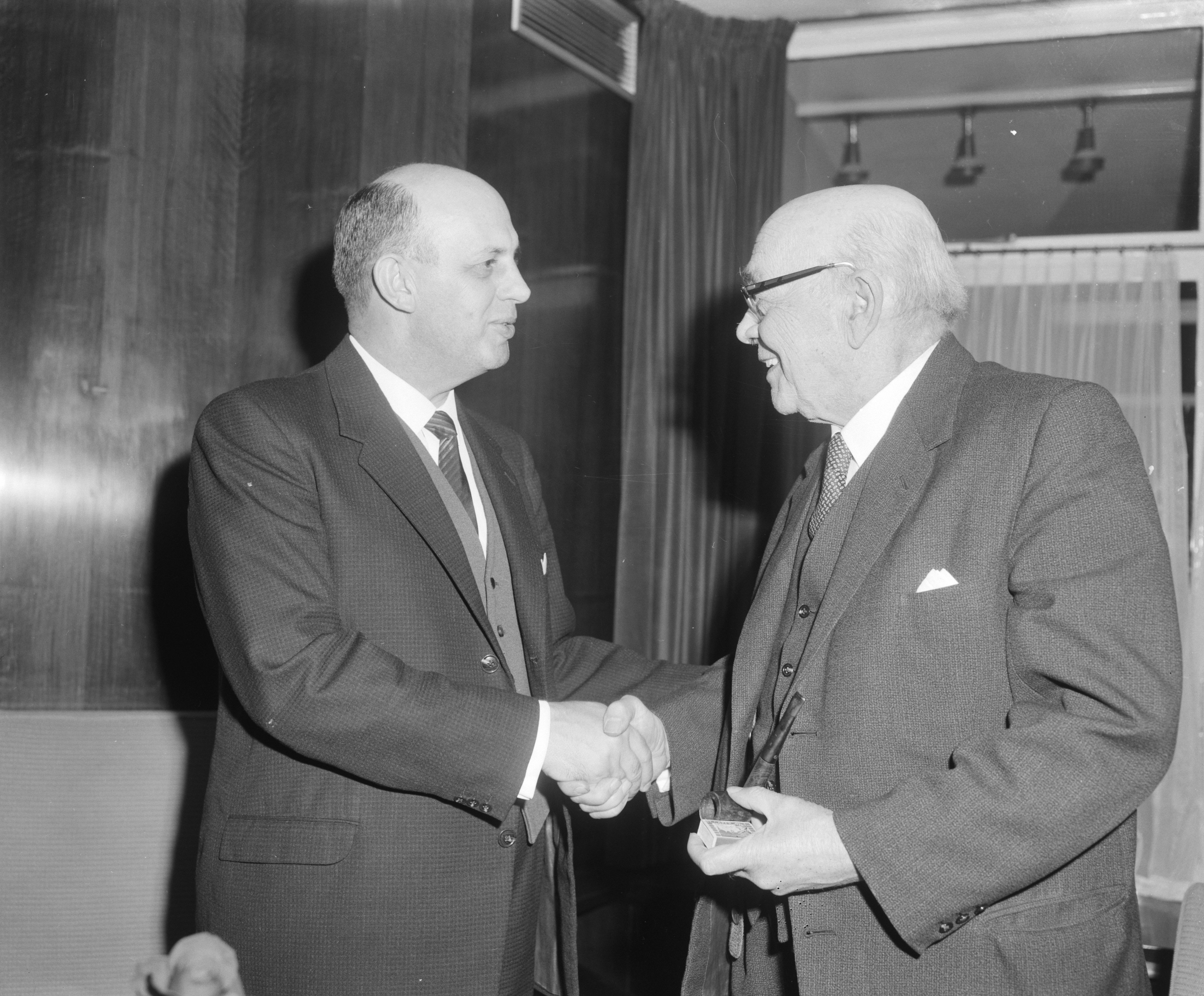 Collectie / Archief : Fotocollectie Anefo Reportage / Serie : [ onbekend ] Beschrijving : Aankomst Zuid Afrikaanse minister van Huisvesting Botha op Schiphol afgehaald door ambassadeur van Zuid Afrika dhr. Rust in Nederland (rechts) Datum : 16 oktober 1963 Trefwoorden : AMBASSADEURS, aankomsten, ministers Fotograaf : Bilsen, Joop van / Anefo Auteursrechthebbende : Nationaal Archief Materiaalsoort : Negatief (zwart/wit) Nummer archiefinventaris : bekijk toegang 2.24.01.04 Bestanddeelnummer : 915-6391